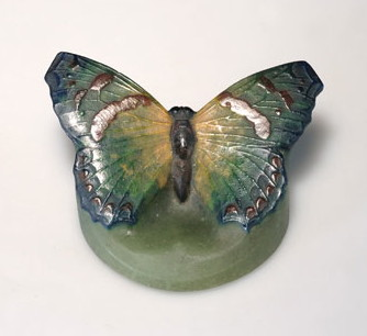 Amalric WALTER & Henri BERGÉ, Presse-papier "petit mars changeant", ca.1925, 8x8x5cm